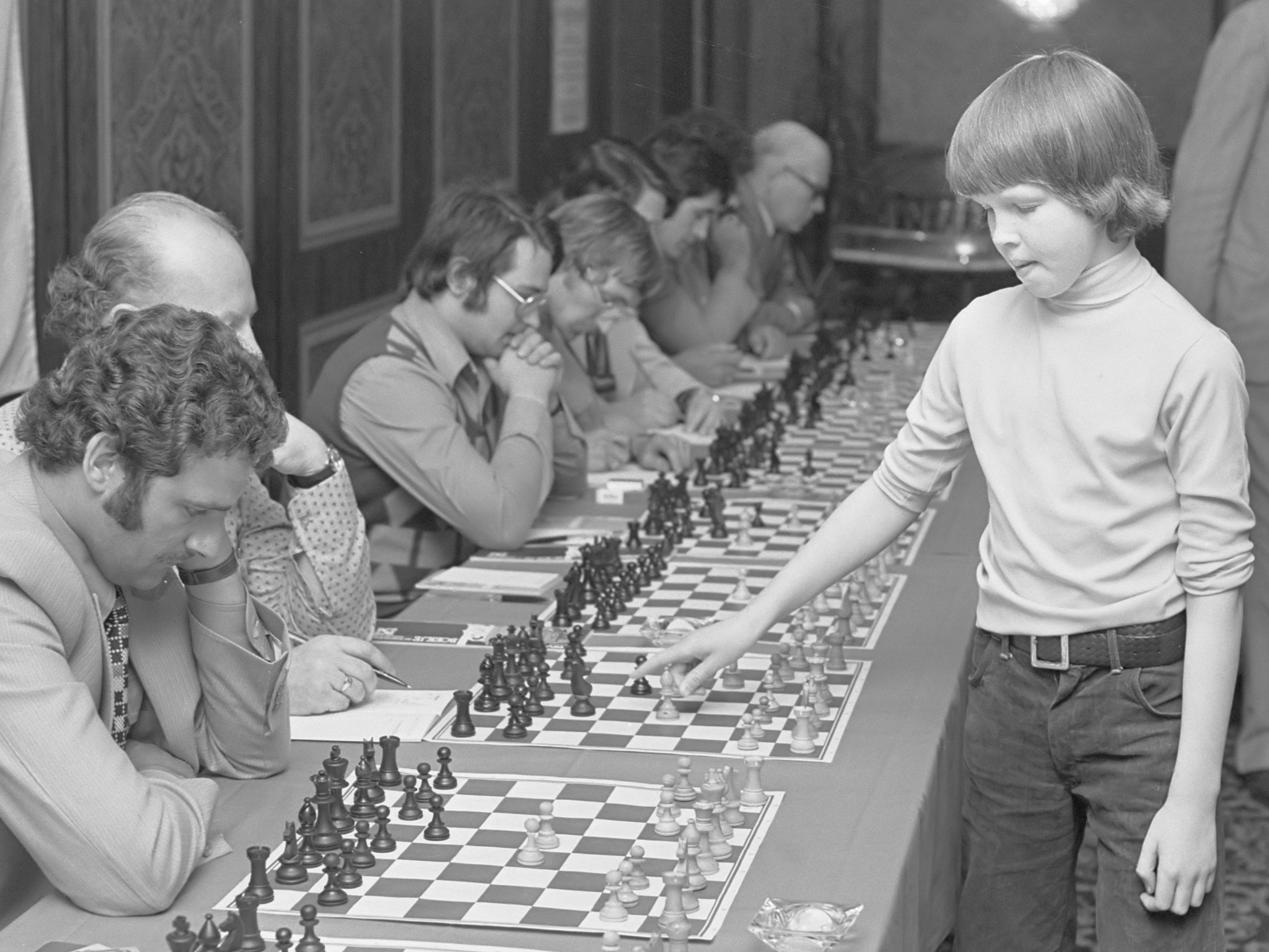 Tien-jarig schaakwonder Nigel Short uit Engeland speelt simultaan "vluggertje" tegen grootmoeder Olafsson 17 mei 1976